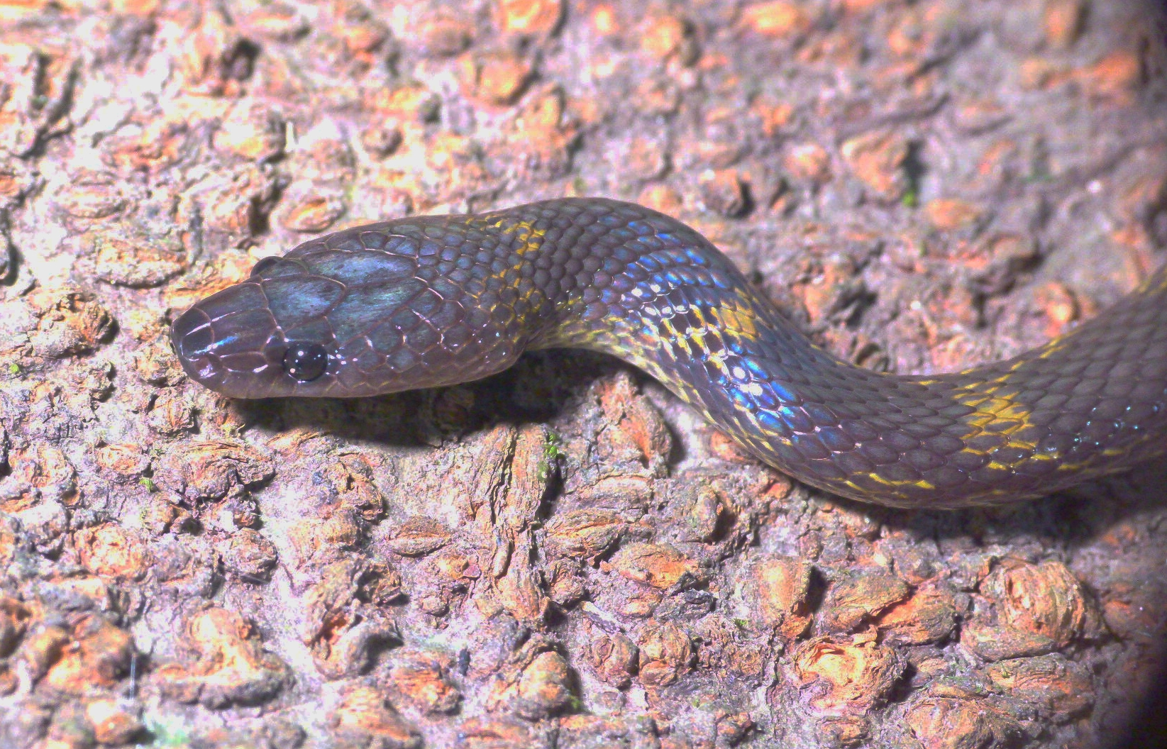 Lycodon travancoricus, Wynaad, India